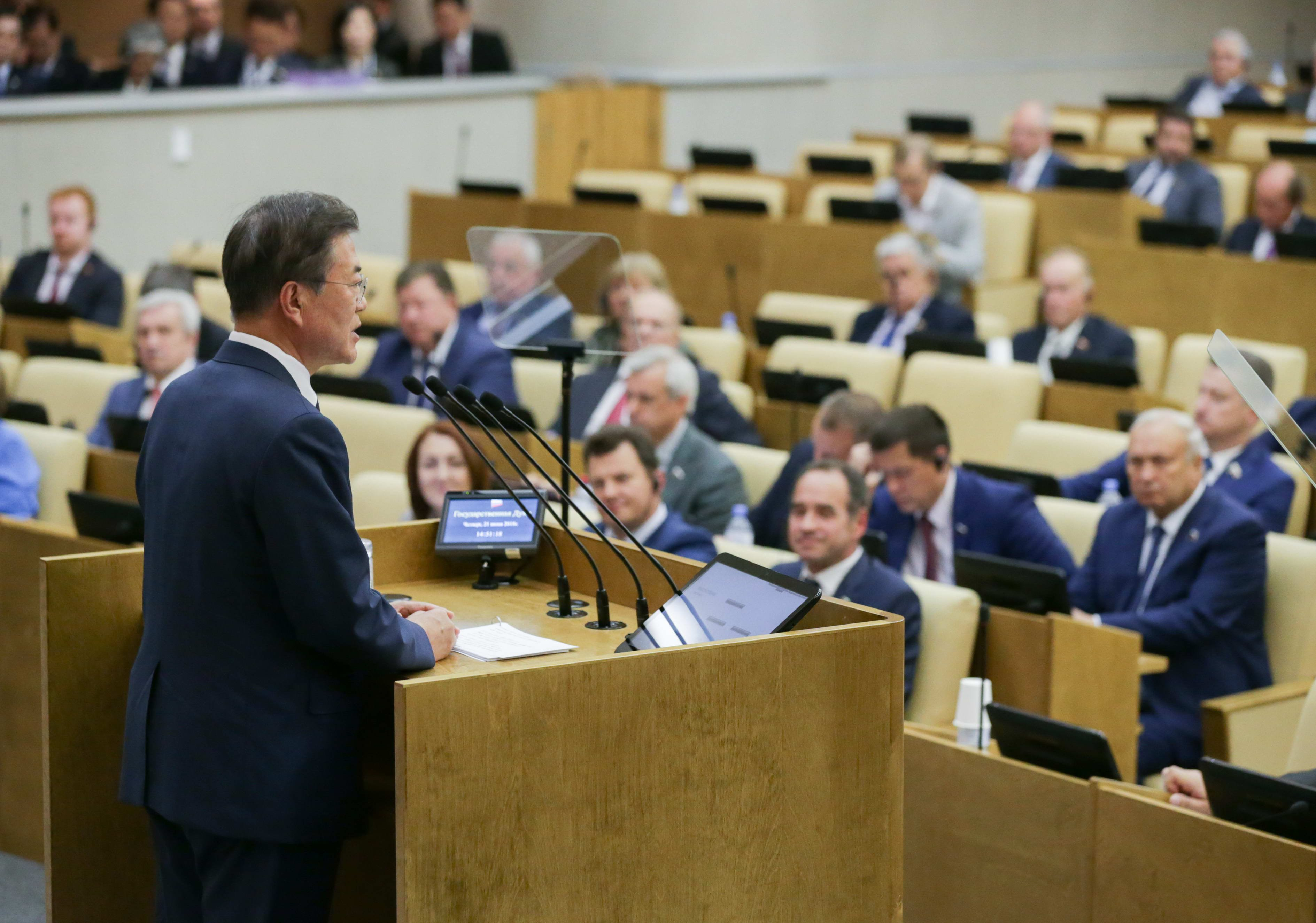 Moon Jae-in in the Russian State Duma (2018-06-21)